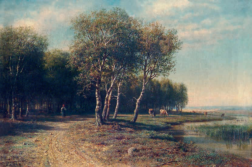 Landscape